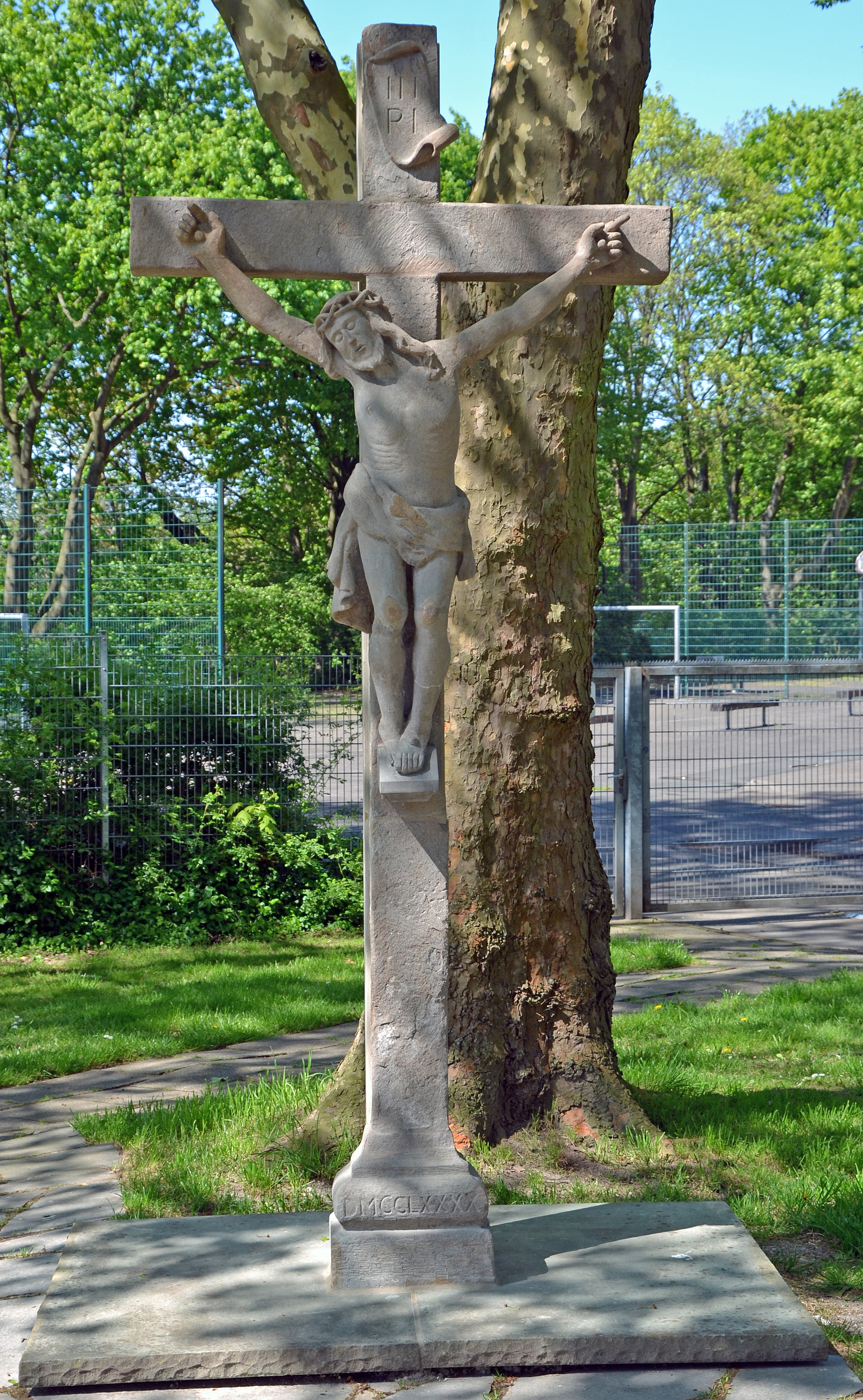 Missionskreuz an der Raumerstraße in Essen-Frohnhausen